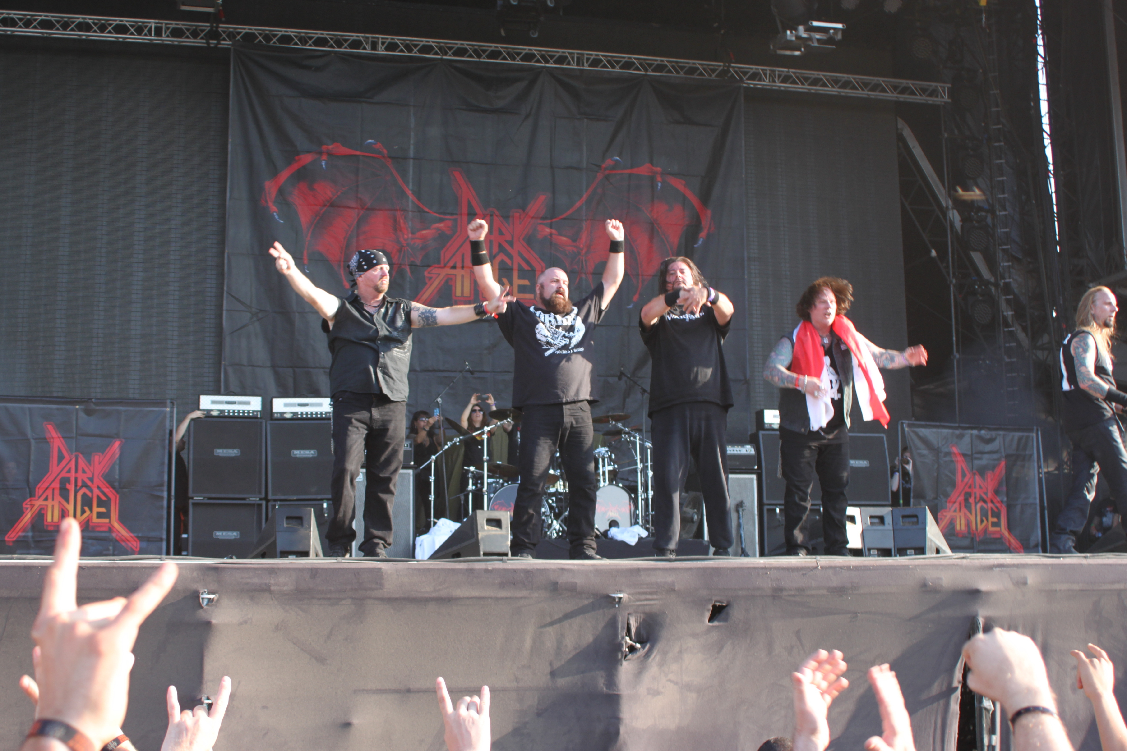 Hellfest 2014. Dark Angel. Fr-44-Clisson.